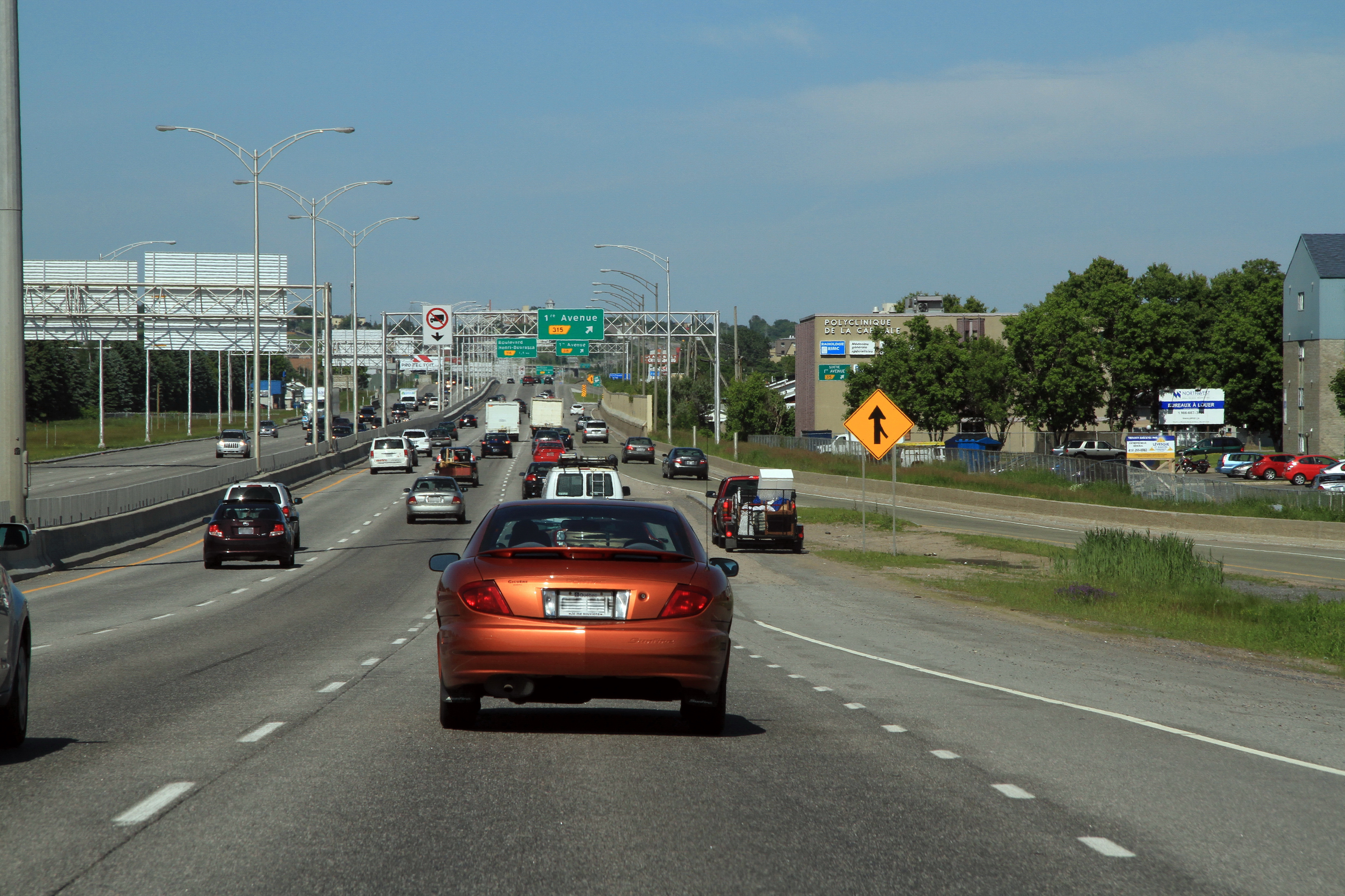 Autoroute Félix-Leclerc (A40) en direction Est à la hauteur du viaduc de l'autoroute Laurentienne (A73) à Québec.